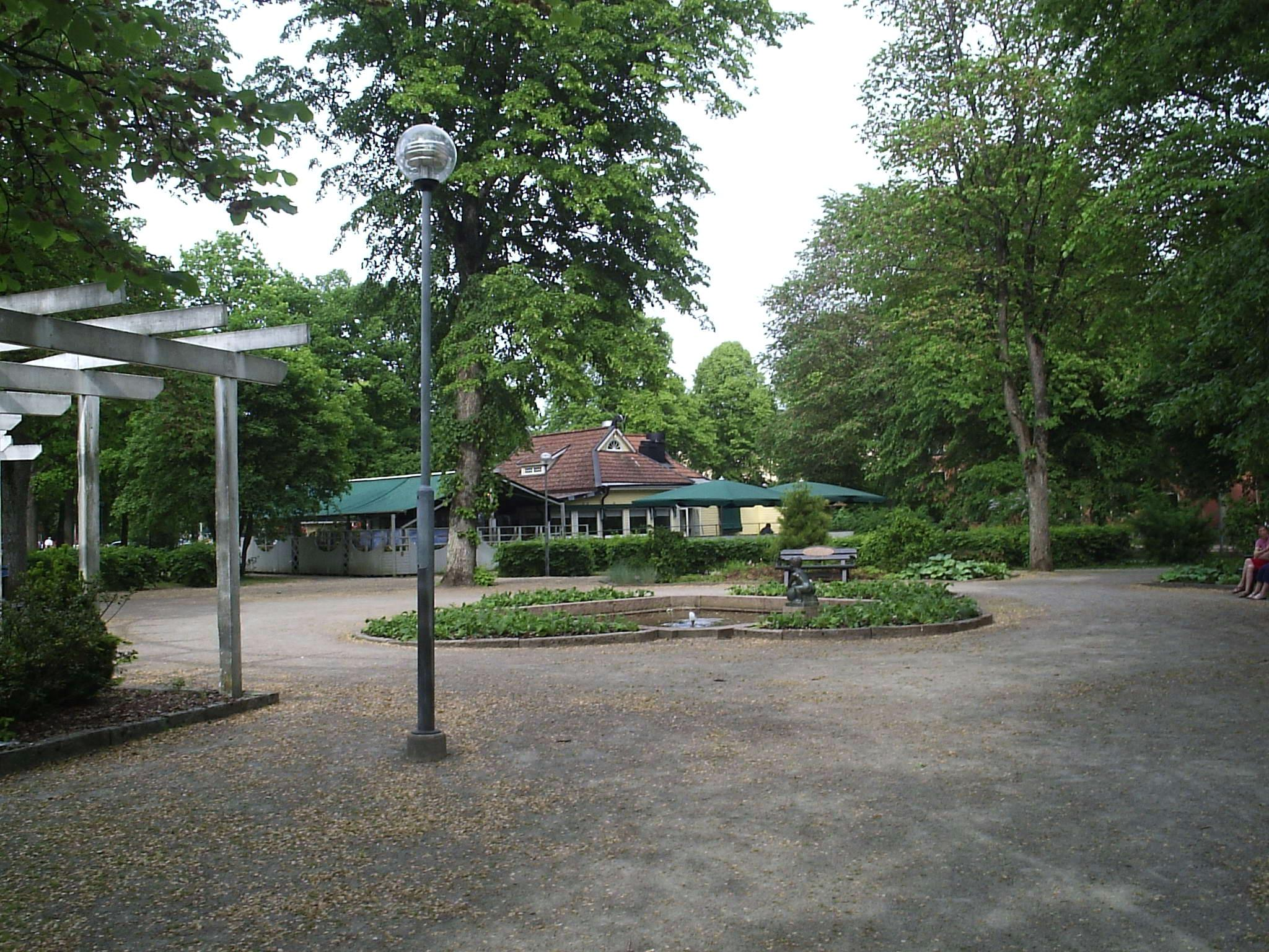 Planteringsförbundets park (allmänt kallad Plantis) i centrala Falköping, Västergötland, Sverige. Bilden är fotograferad av Harri Blomberg.